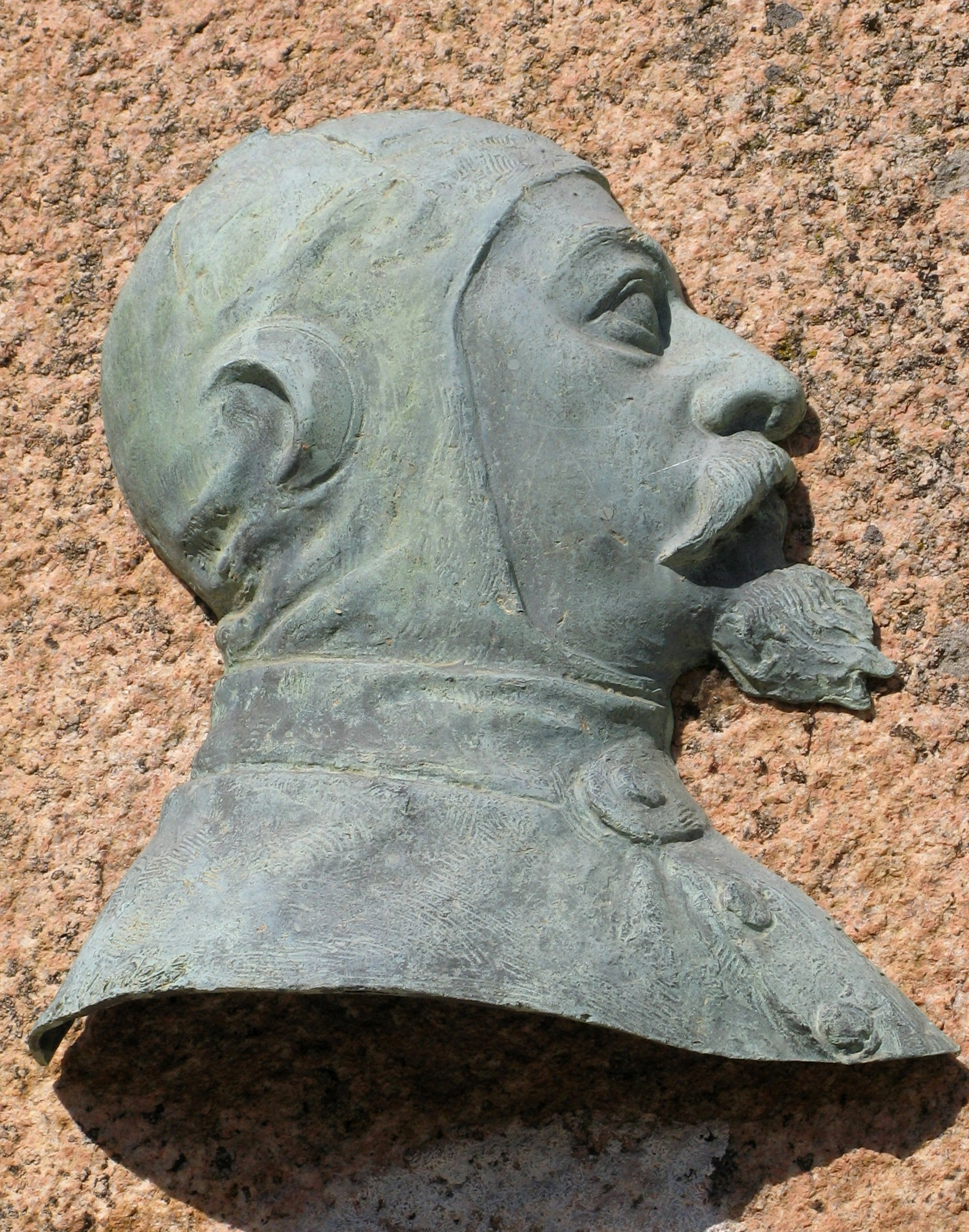 Beschreiwung: De Louis Capazza um Monument vun 1928 um Col de San Bastiano op Korsika .